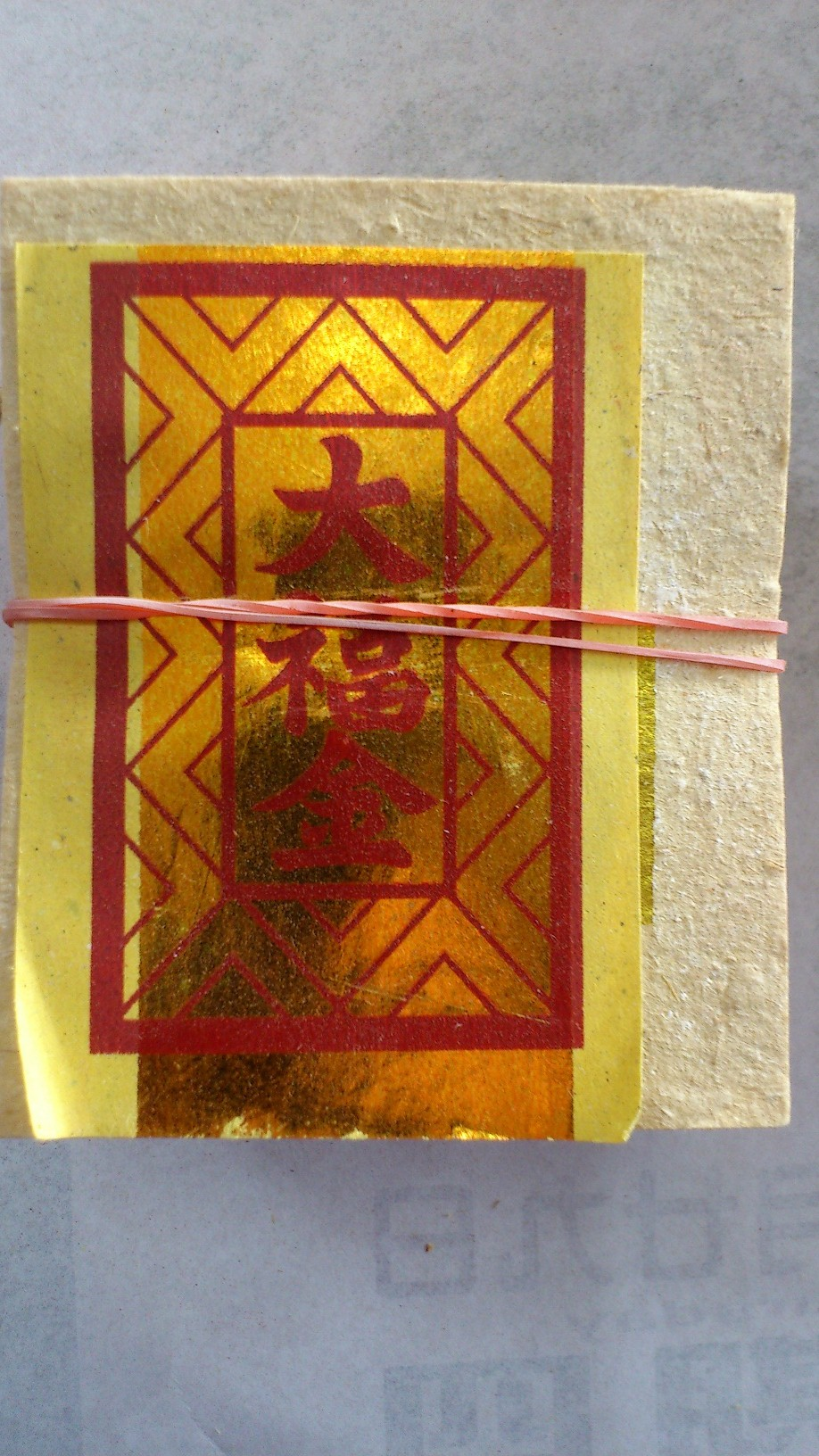 福金